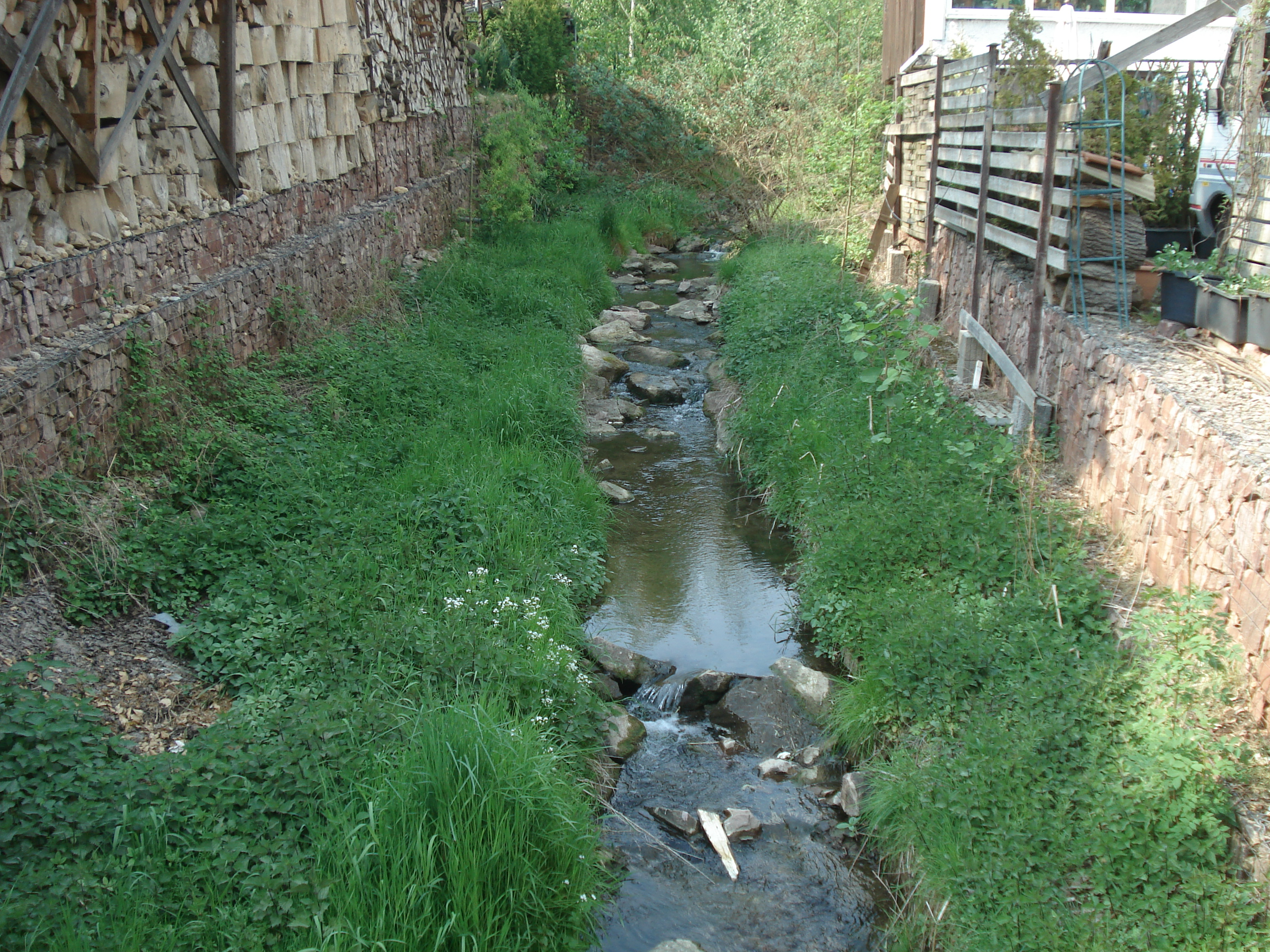 Der Glattbach in Aschaffenburg